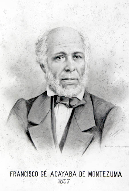 O político e jurista Francisco Jê Acaiaba de Montezuma, Ministro dos Estrangeiros e da Justiça do Brasil no período regencial, Visconde de Jequitinhonha, herói na Guerra pela Independência da Bahia.